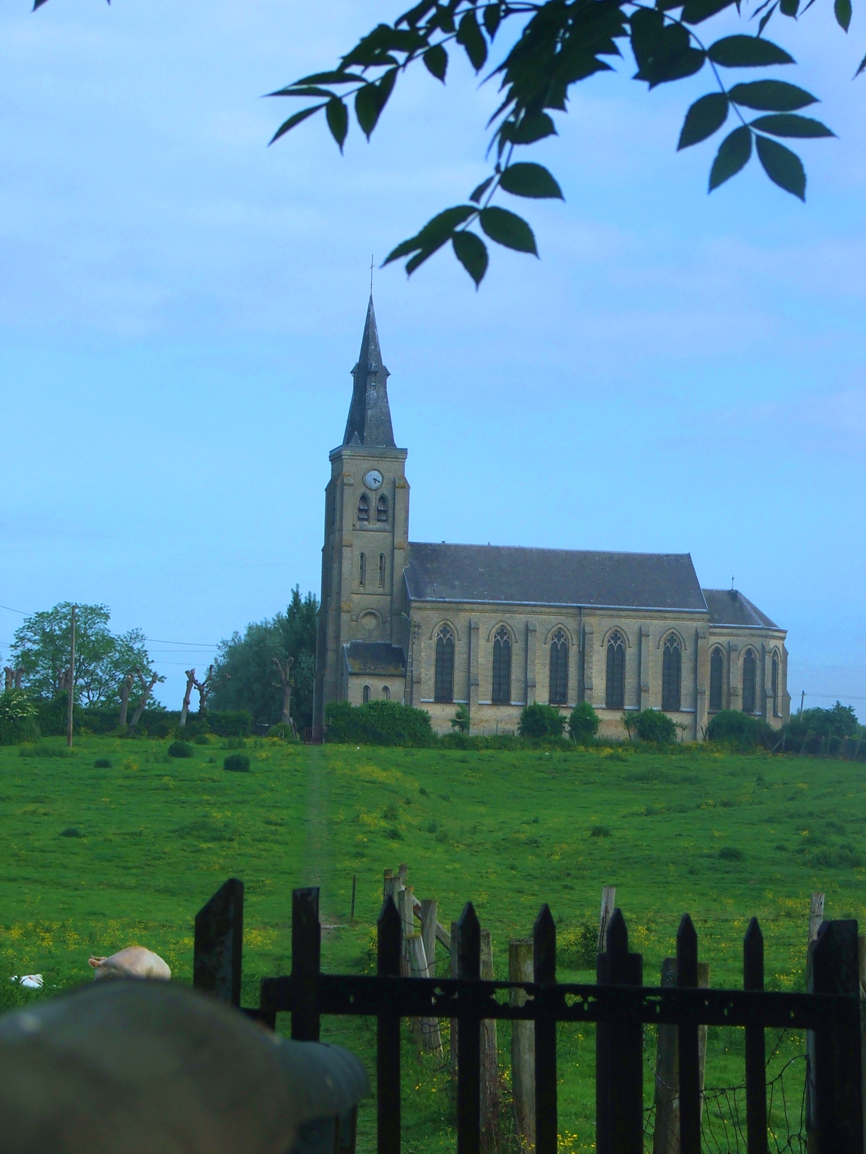 Eglise de St Momelin